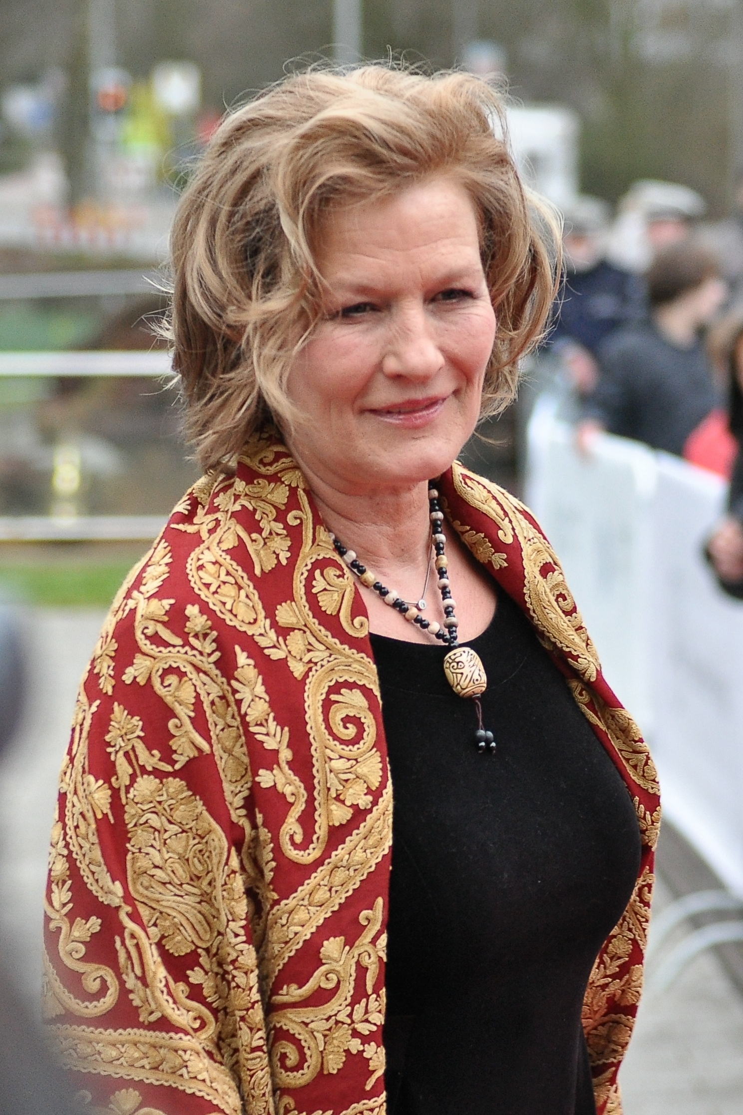 Verleihung des Grimme-Preises 2015.